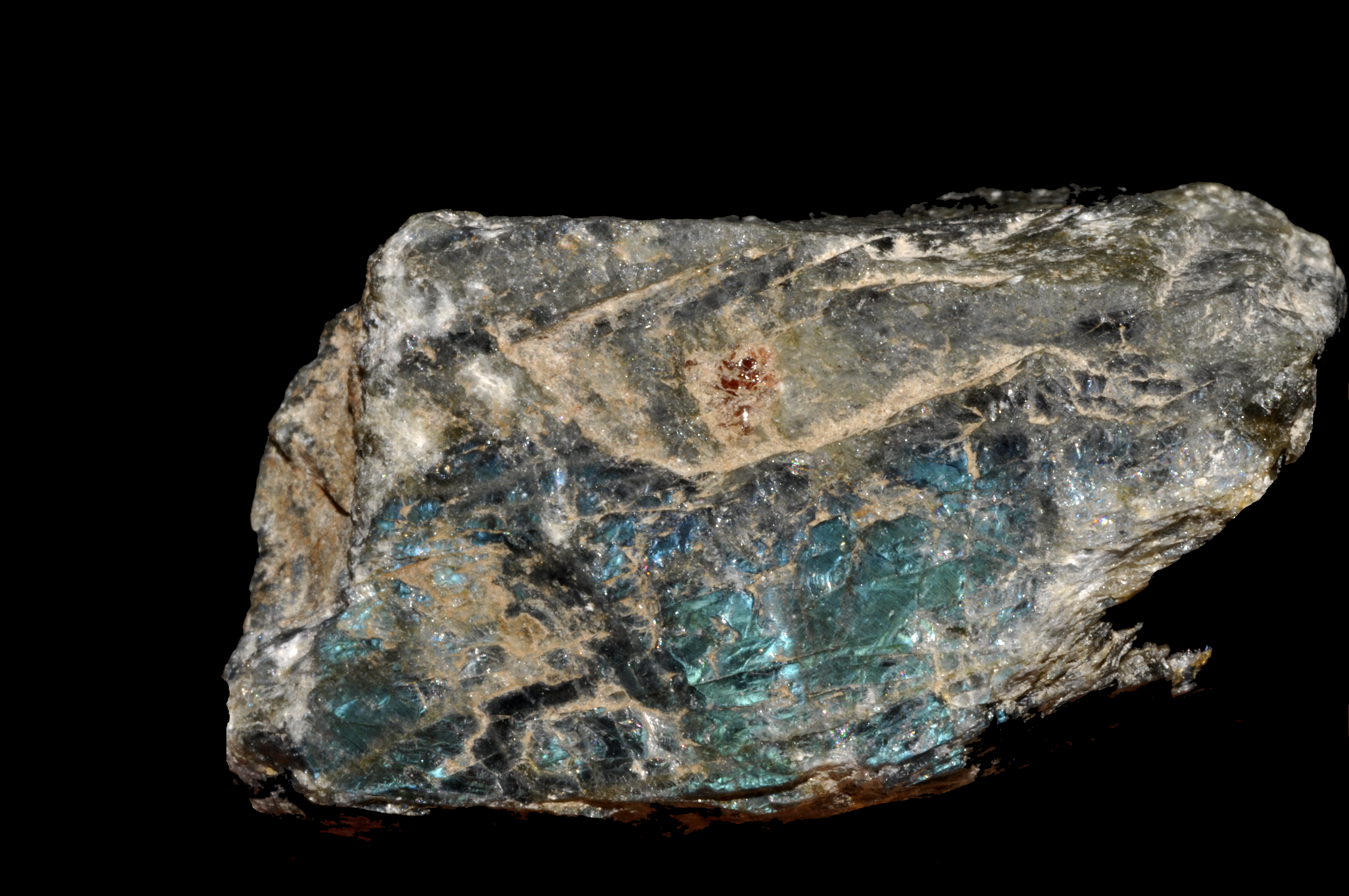 bloc de labradorite brute